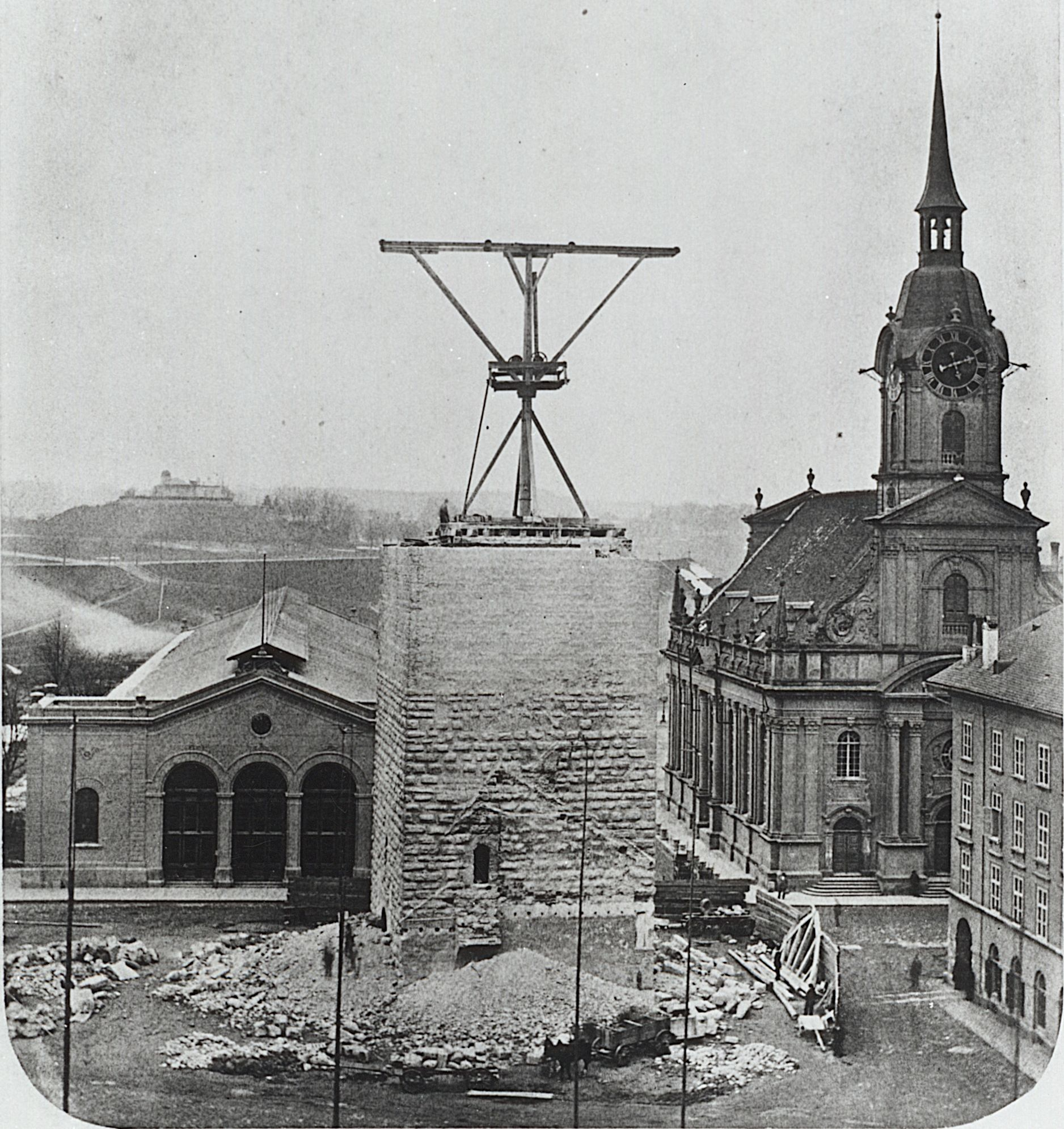 Ein Foto, das während des Abbruchs des Christoffelturms im Frühjahr 1865 gemacht wurde. Im Hintergrund die Heiliggeistkirche und der Bahnhof Bern.